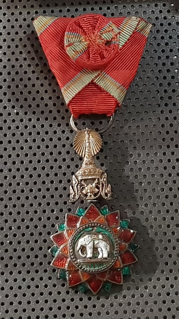 Syjamski Order Słonia Białego - odznaka kawalerska